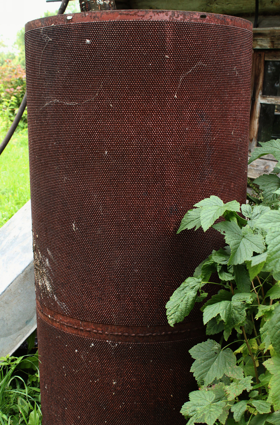 Цилиндр триера